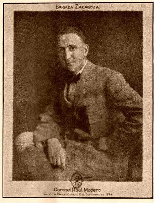 Coronel Raúl Madero